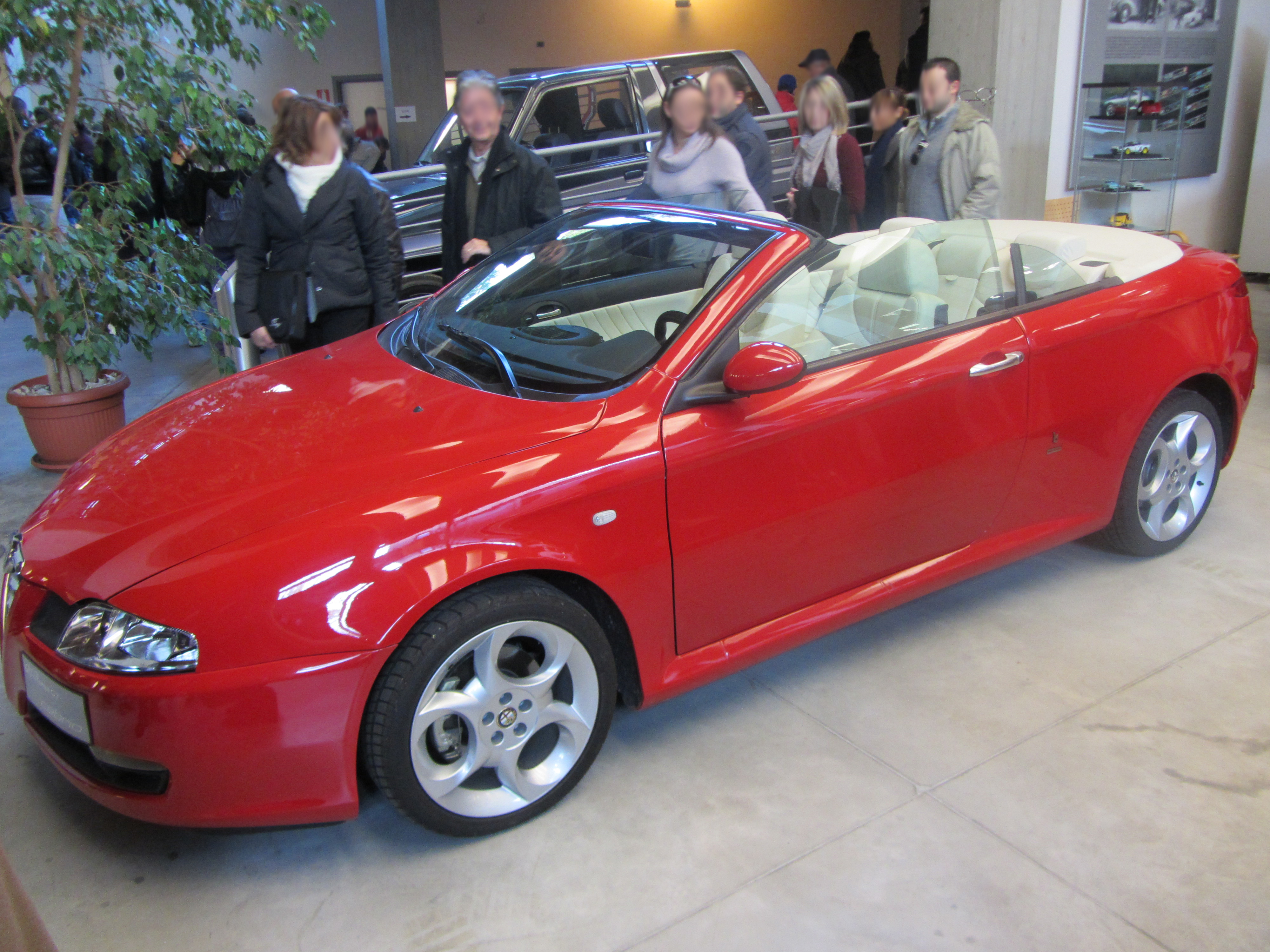 Alfa Romeo GT cabrio concept al Museo Bertone